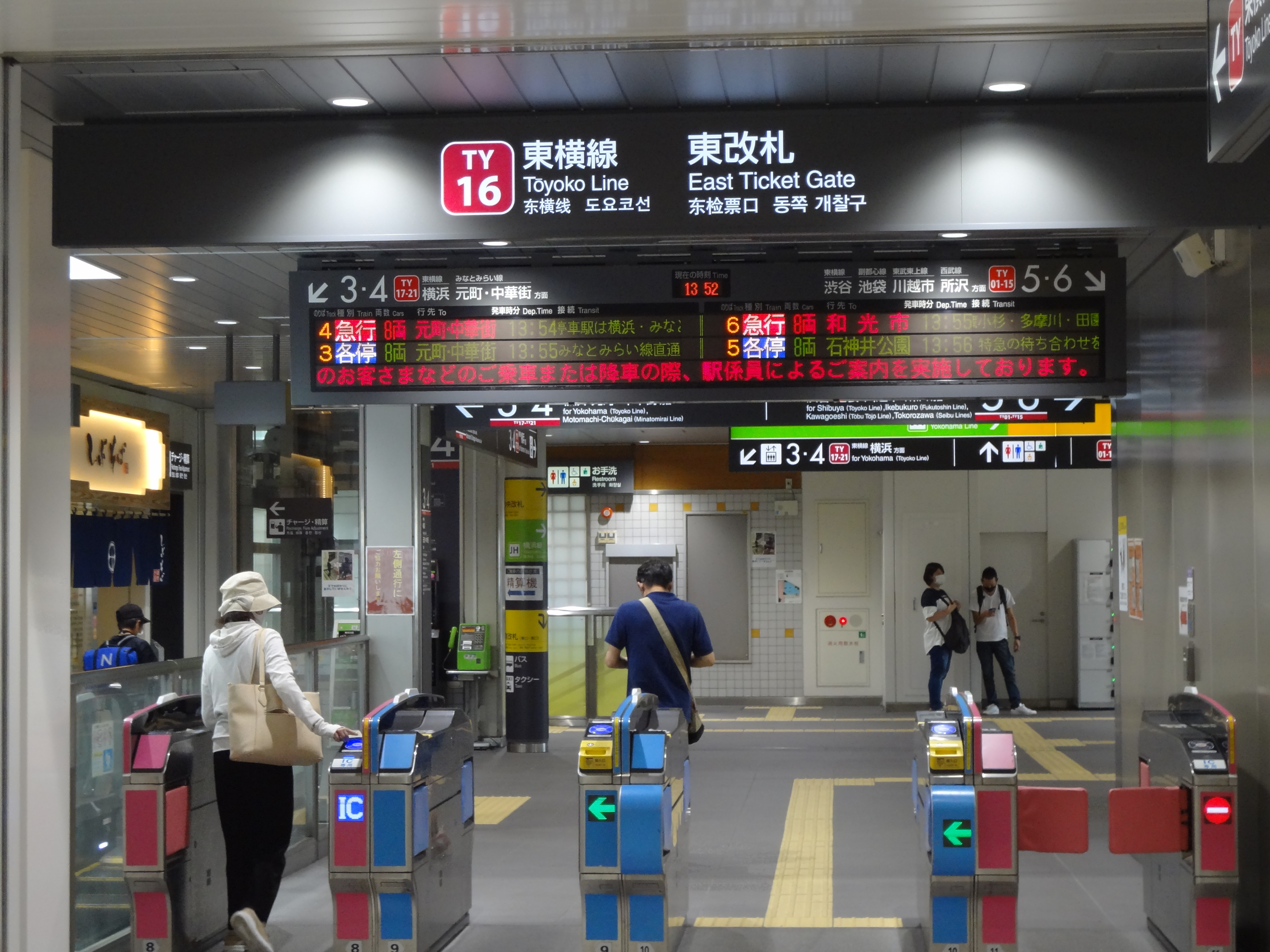 菊名駅東改札口